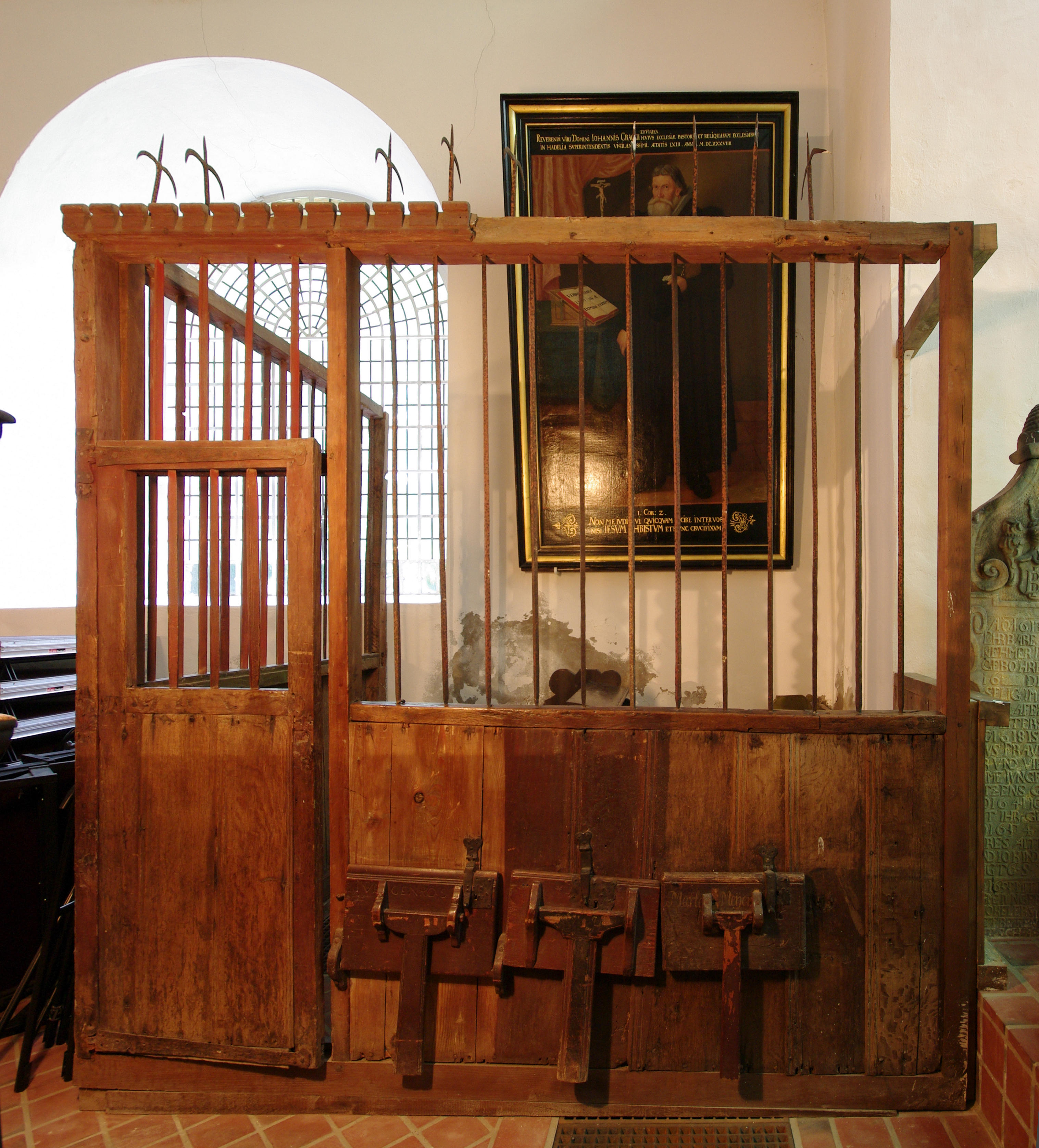 Das Kirchengefängniss